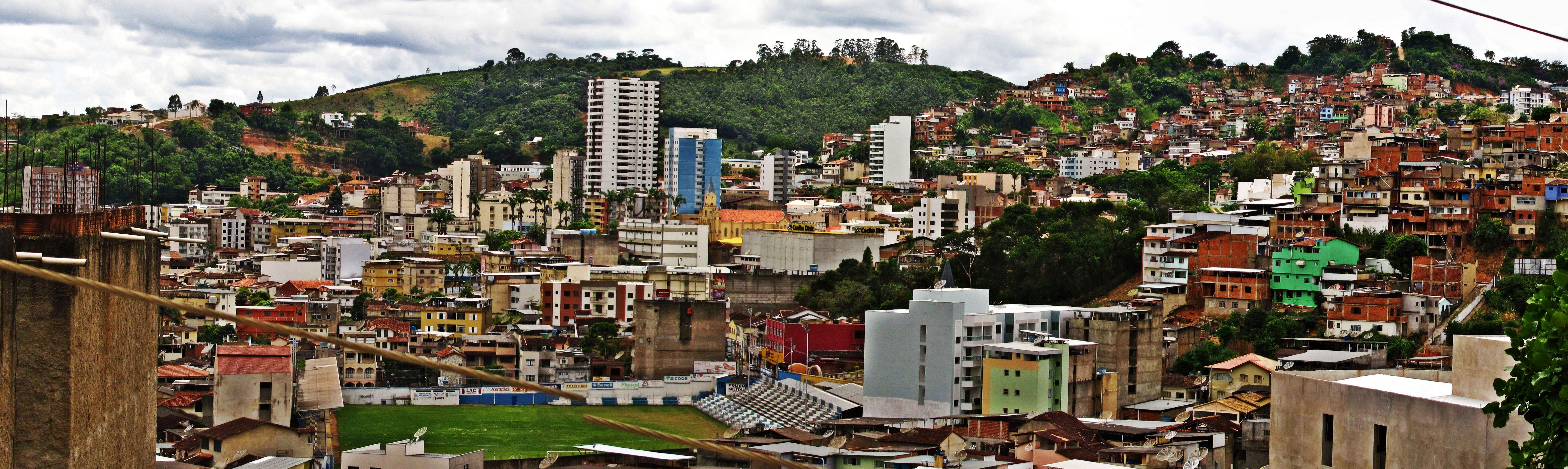 Centro de Manhuaçu visto do bairro de Todos os Santos. Foto panorâmica.